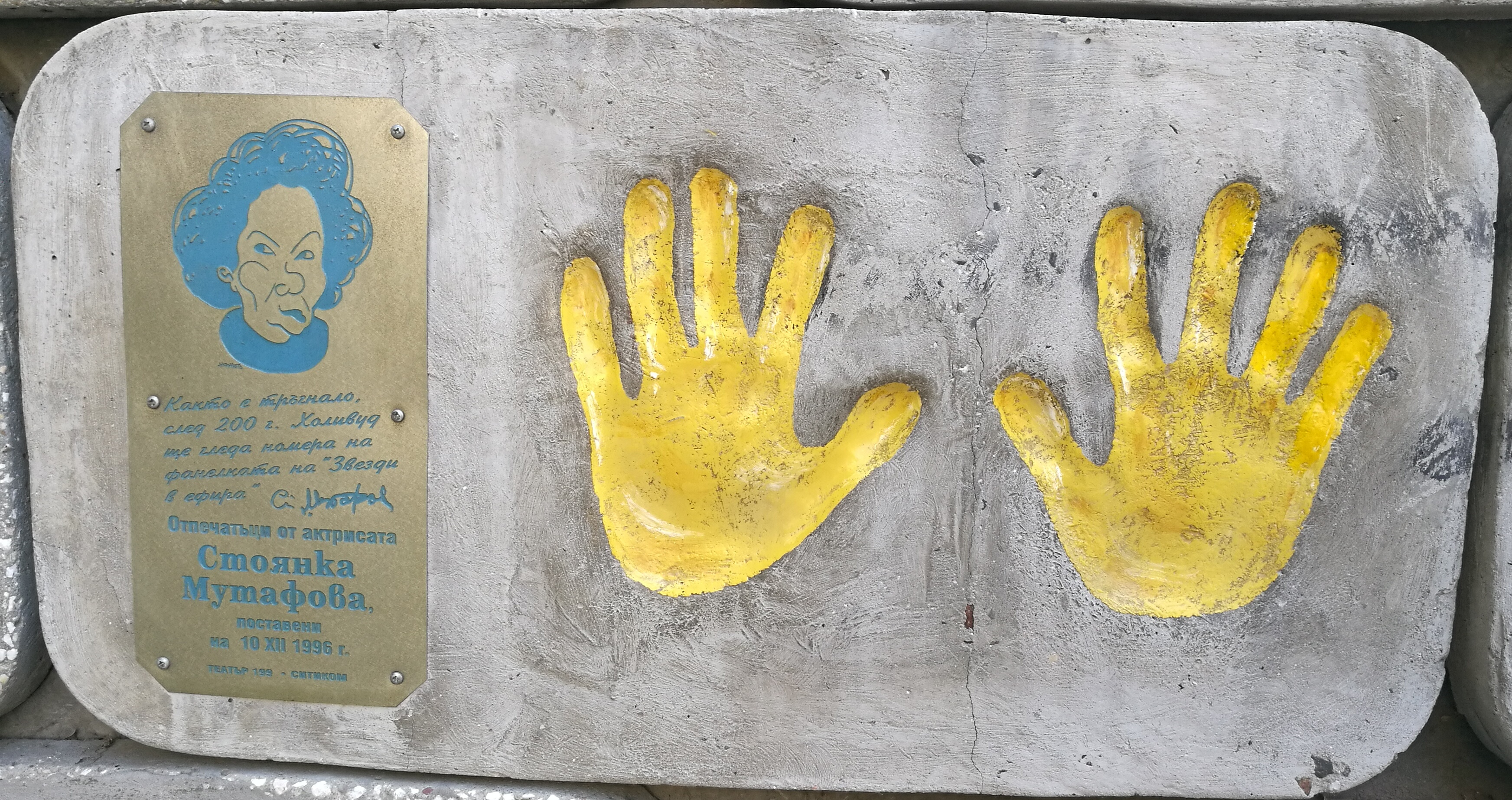 Стената на славата пред Театър 199 - пано с отпечатъци, послание и шарж на Стоянка Мутафова.